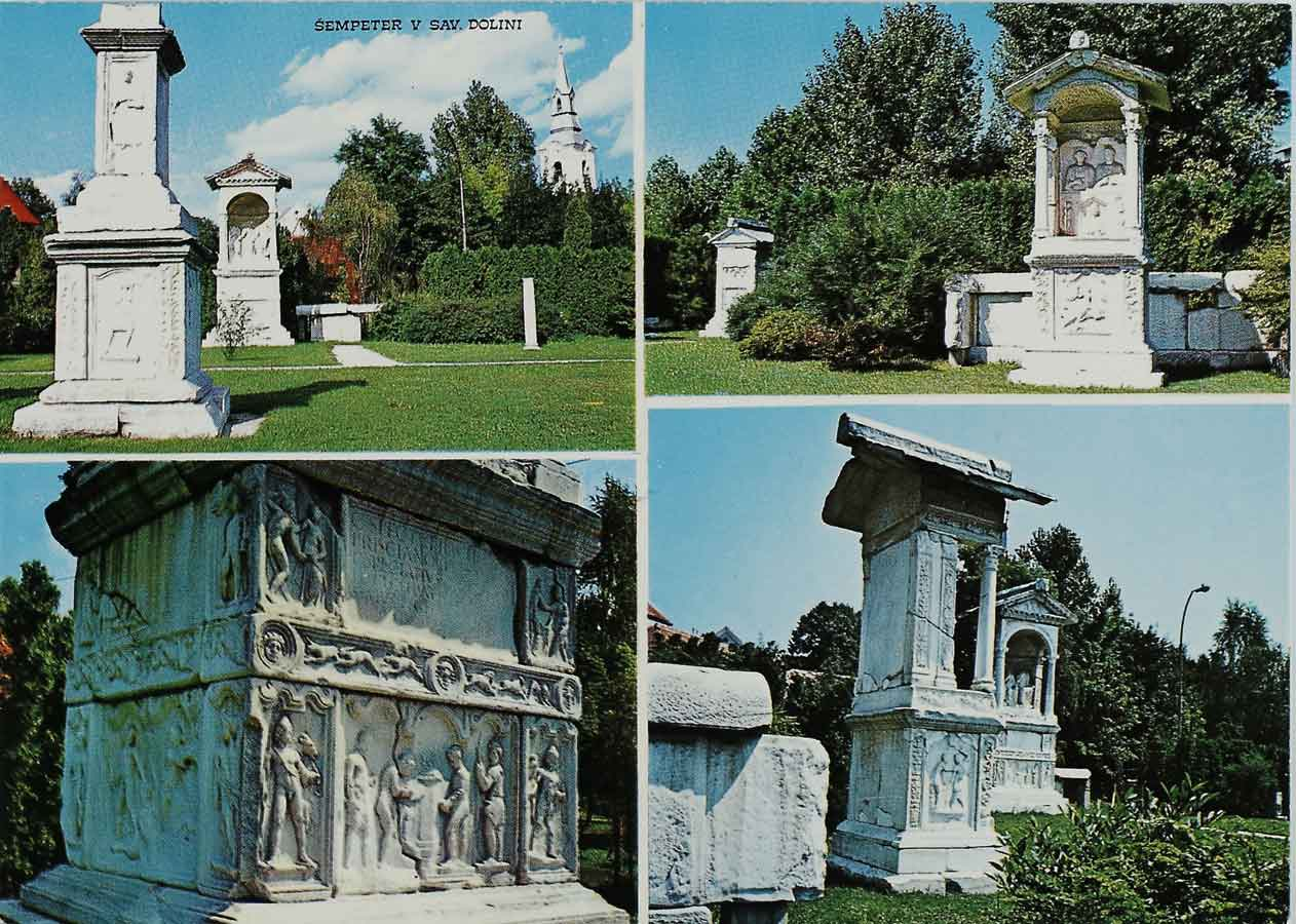 Razglednica Šempetra v Savinjski dolini.